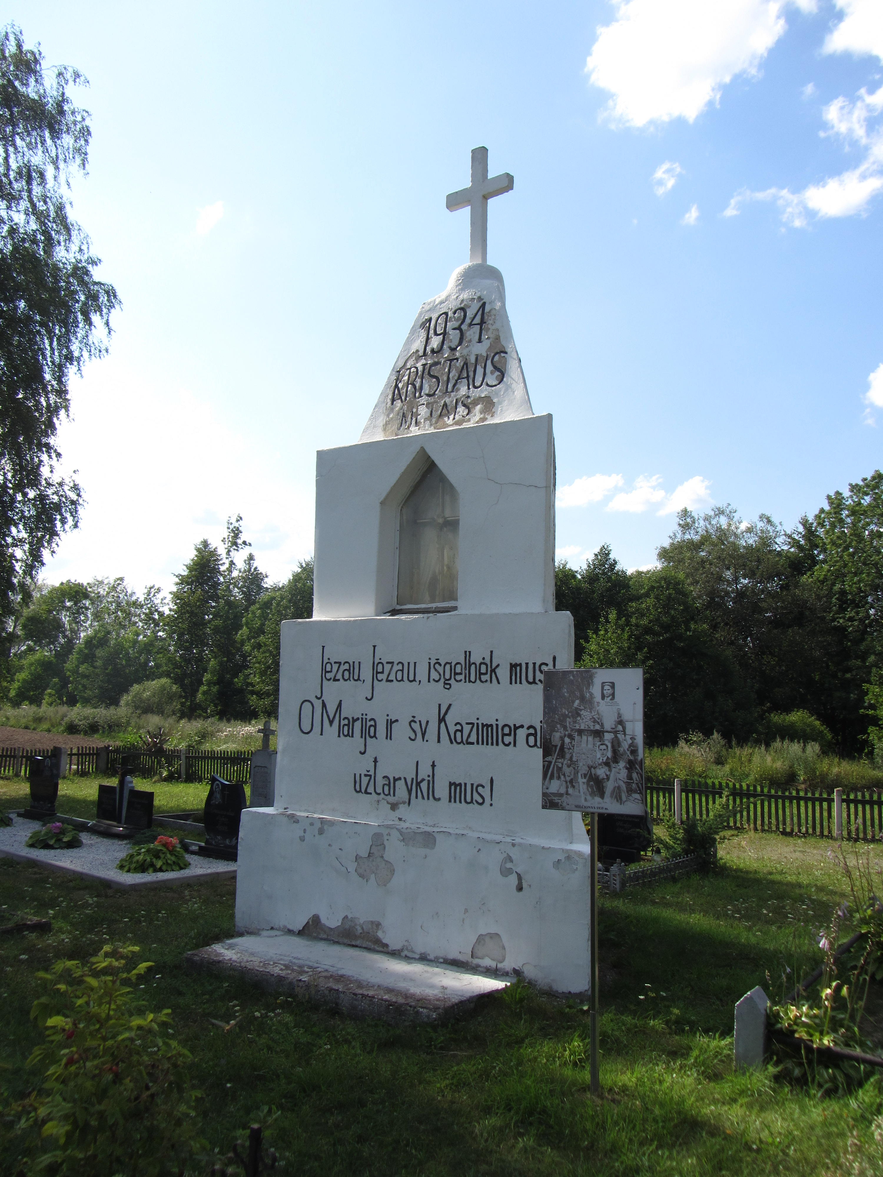 Mielagėnų sen., Lithuania